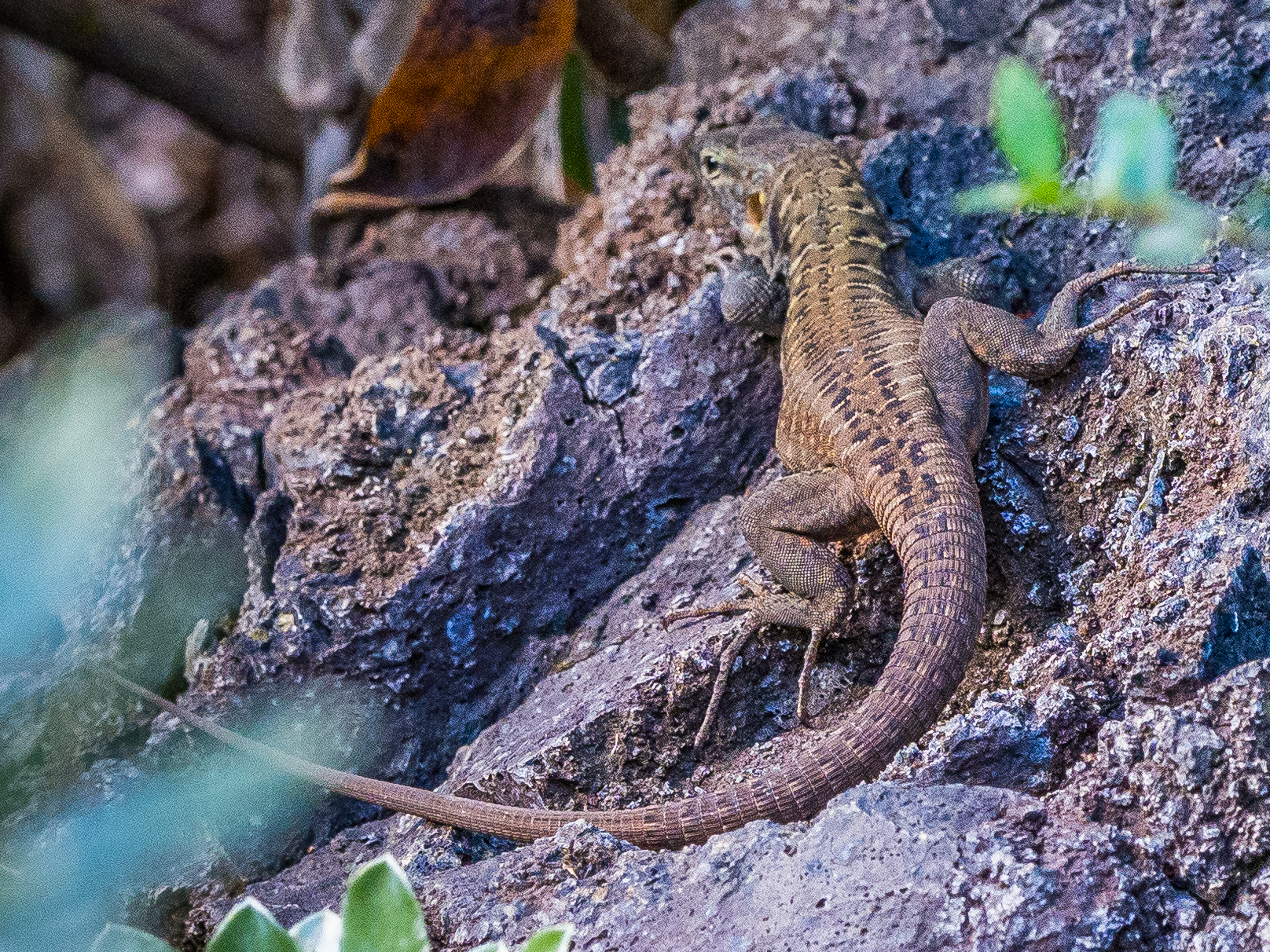 Viera y Clavijo Botanical Garden Las Palmas Gran Canaria